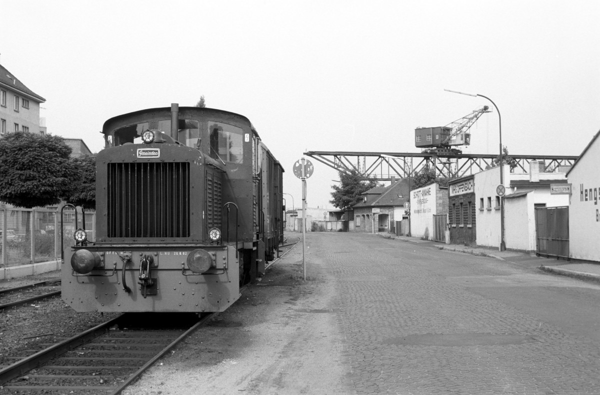 Typische Hafenatmosphäre mit Lok 1 am 11. August 1985.